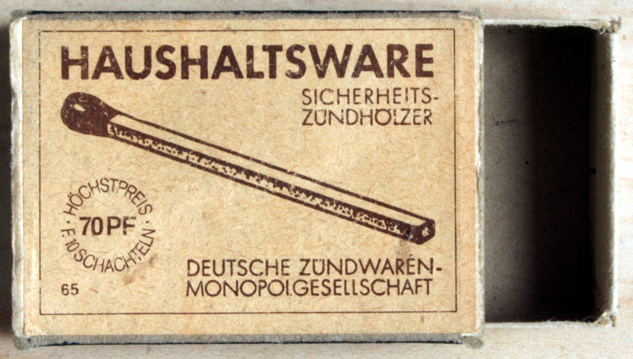 Streichholzschachtel Haushaltsware 7Pf